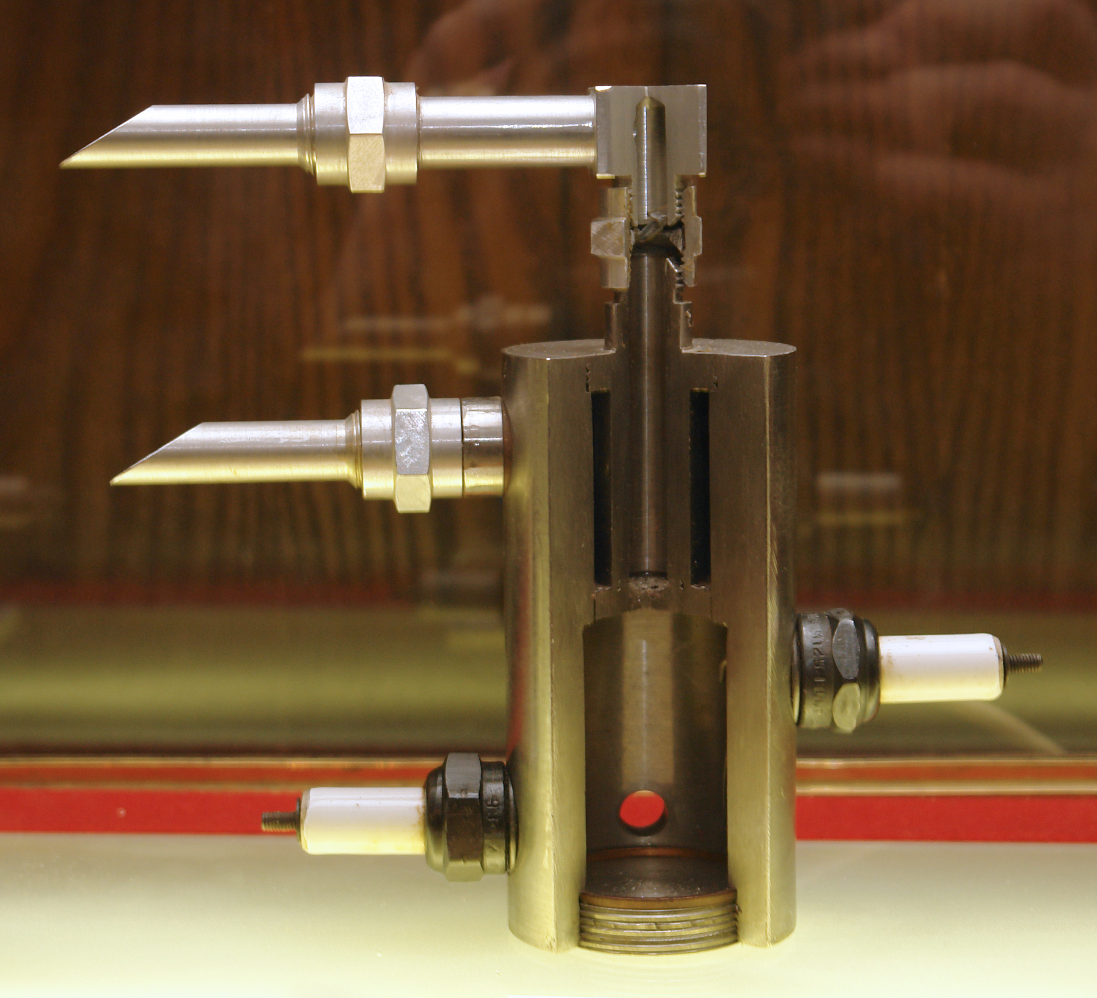 Экспериментальный жидкостный ракетный двигатель ОРМ-4. Музей космонавтики и ракетной техники; Санкт-Петербург. This photograph was taken in Museum of Space and Missile Technology (Saint Petersburg) Object location59° 57′ 07″ N, 30° 19′ 16″ E